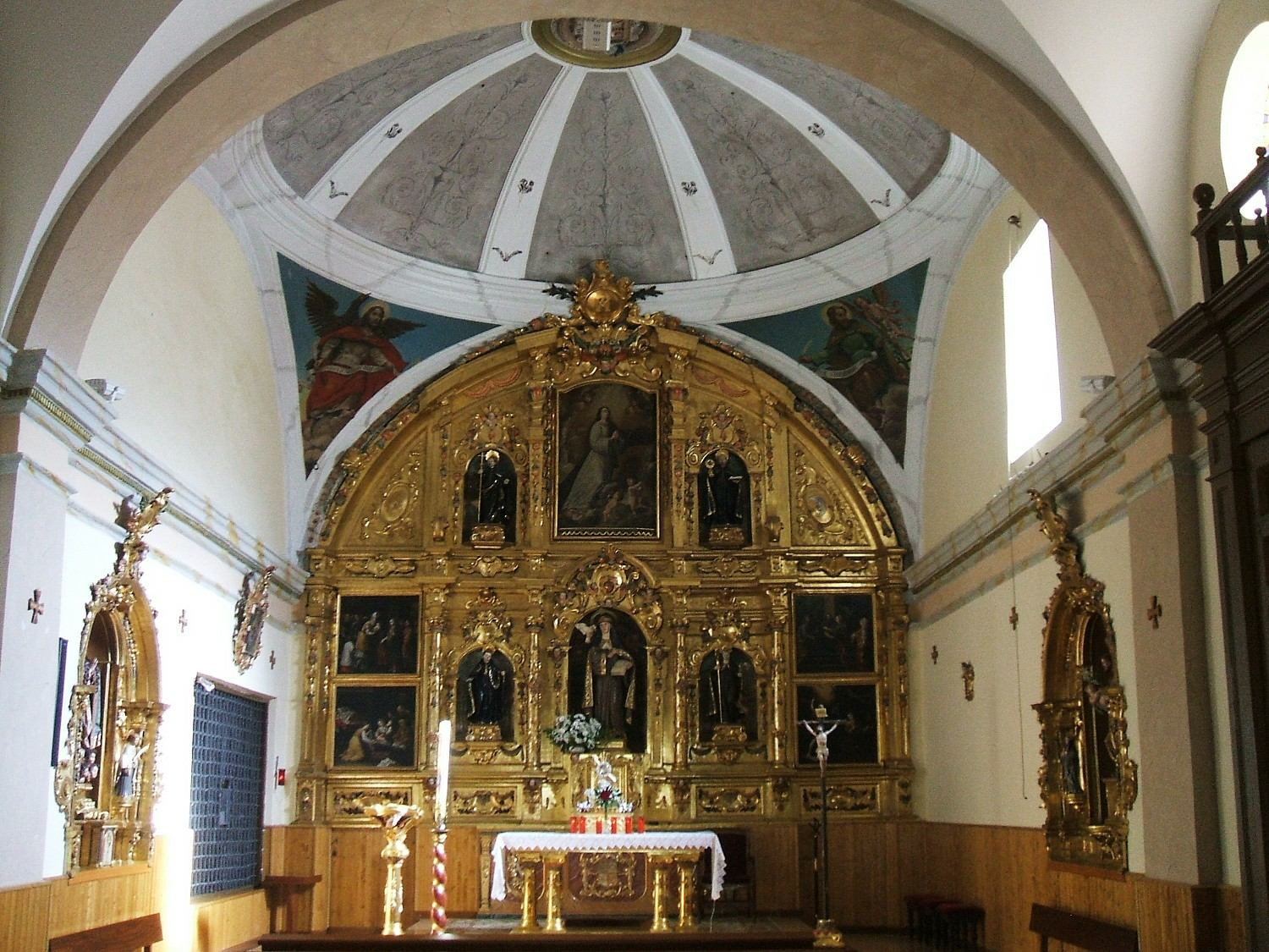 Retablo Mayor de la iglesia del Convento de Santa Brígida, Paredes de Nava, Palencia, Castilla y León, España. Obra de Pedro Bahamonde de 1747.